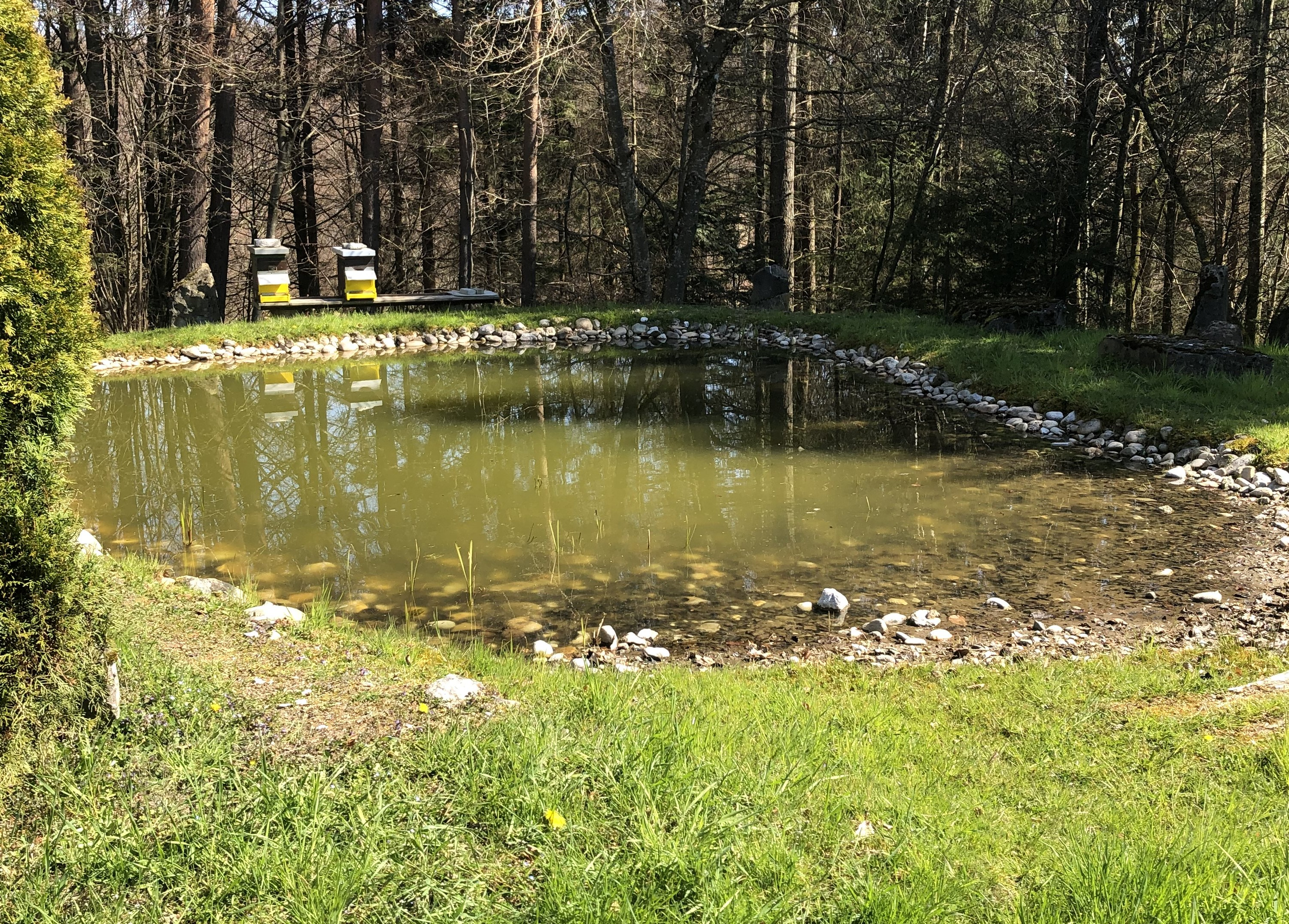 Eichholz Teich in der Wagensiedlung